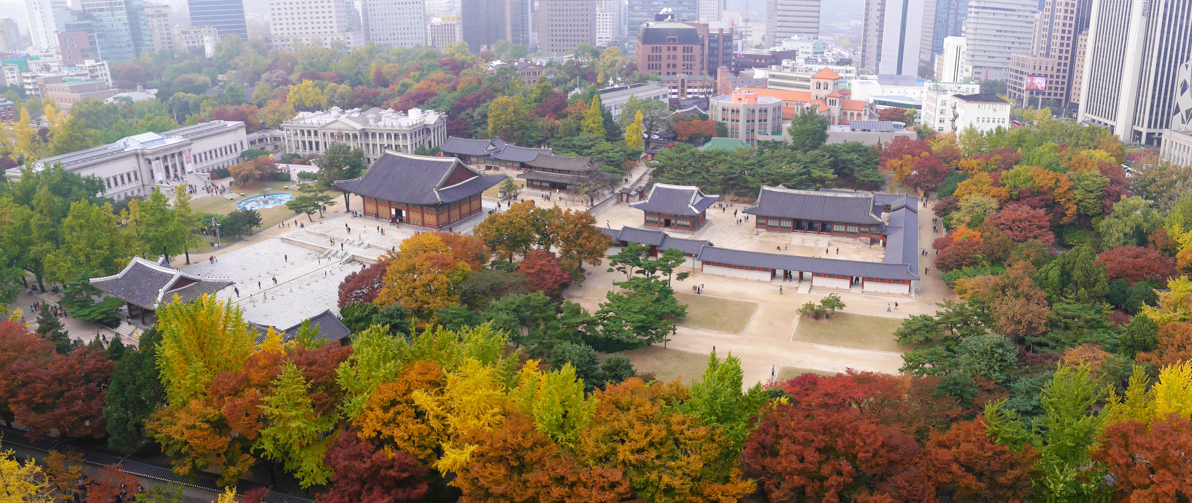 Autumn at Deoksugung